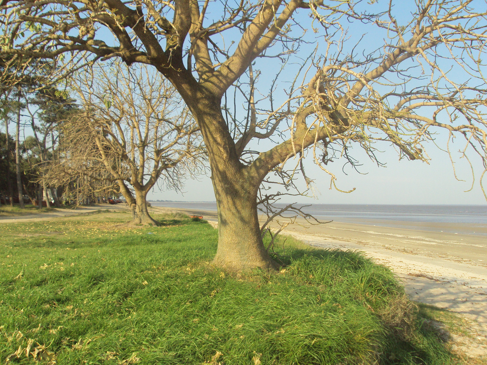 Vista hacia el Este.